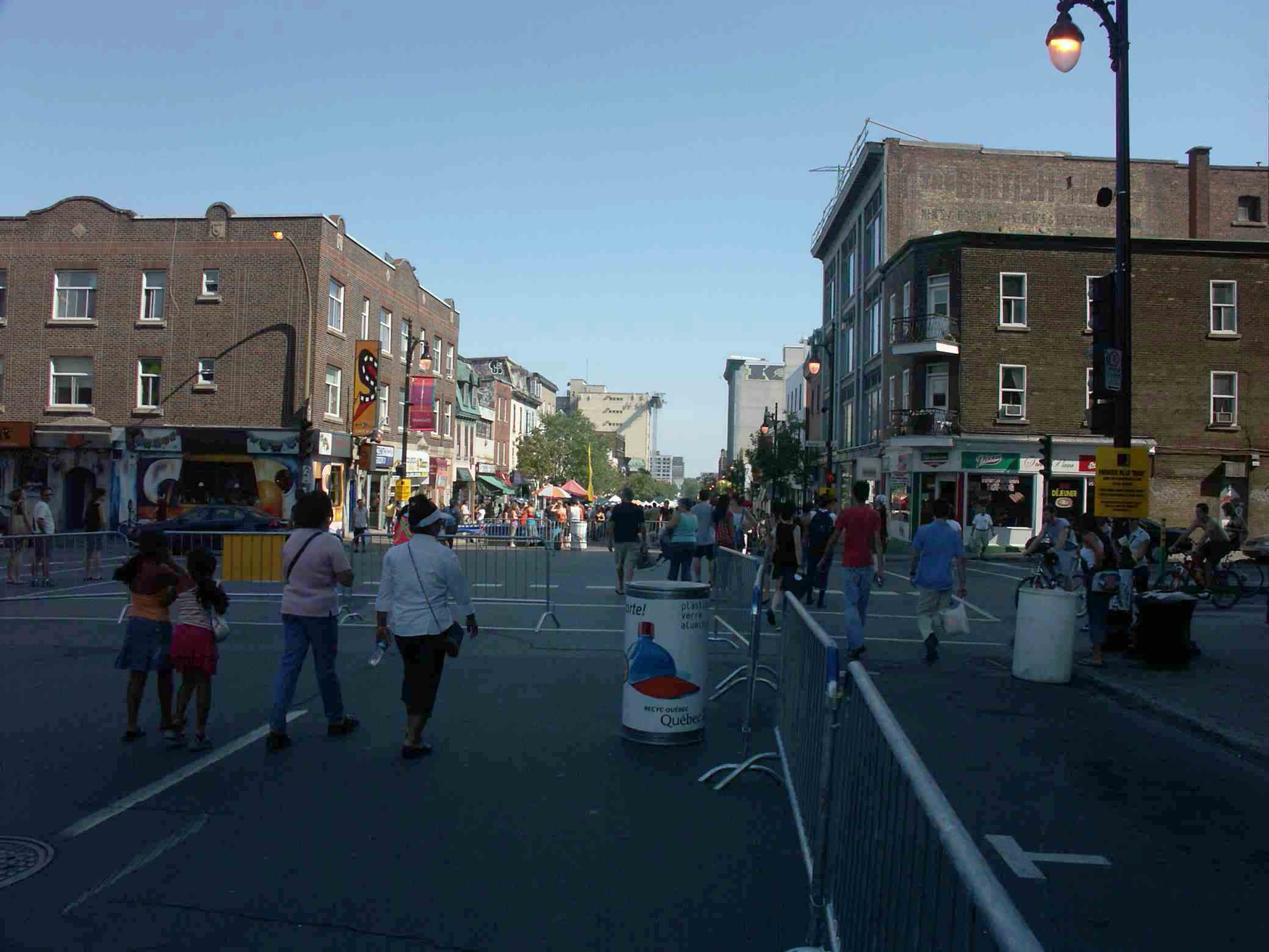 Événement "Frénésie de la Main", d'où la circulation automobile déviée, lors du 100e anniversaire du boulevard Saint-Laurent